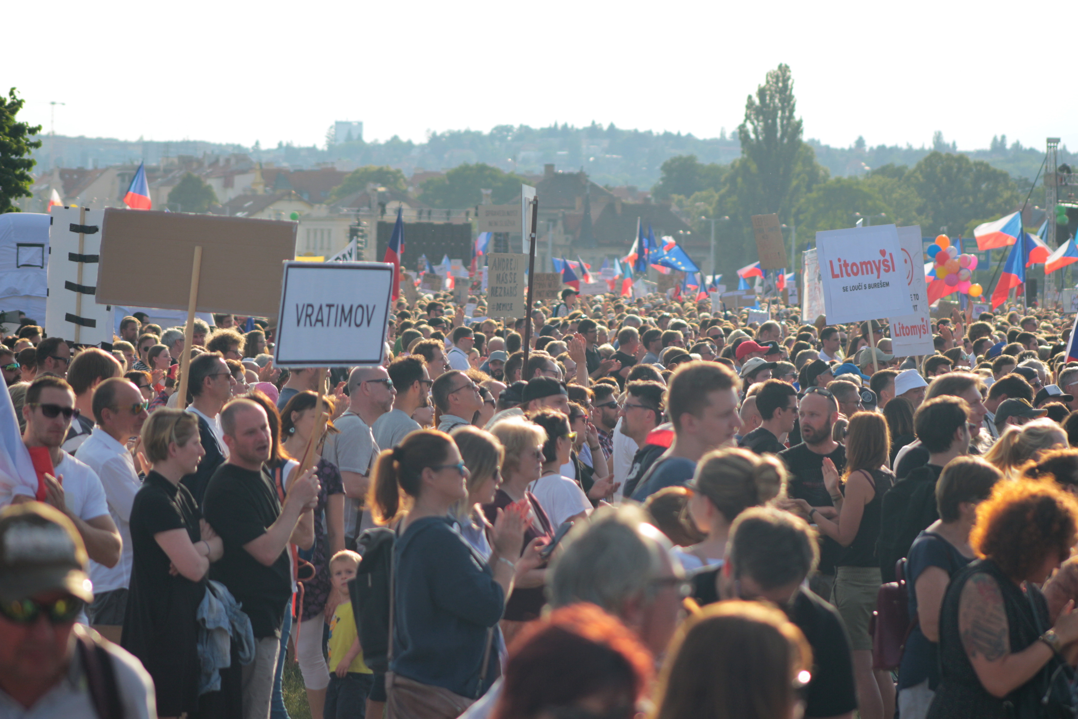 Praha-Letná 2019 demonstrace „Je to na nás!“